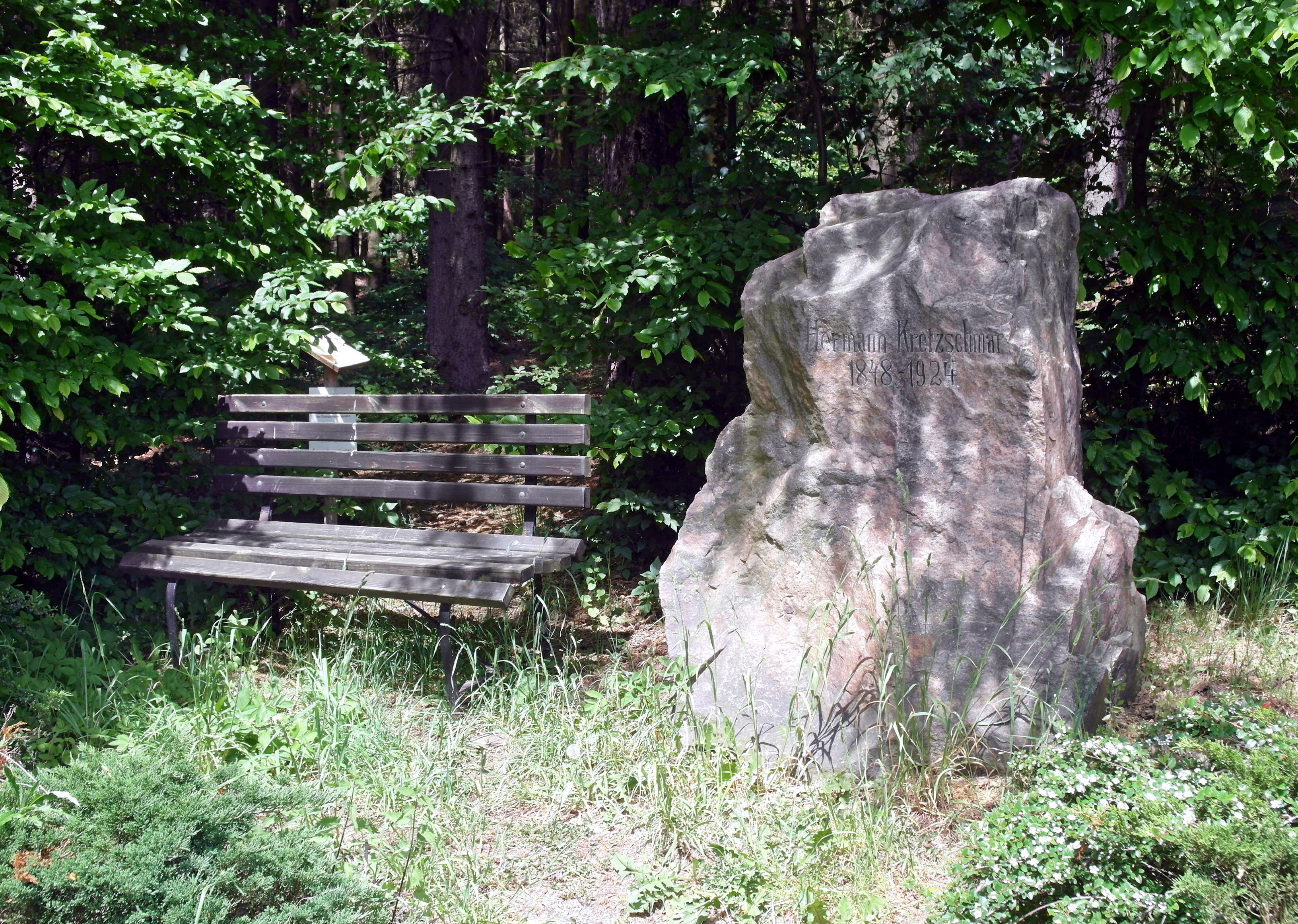 02.06.2015 09526 Olbernhau: Aussichtspunkt Kretzschmarhöhe. Gedenkstein (GMP: 50.663770,13.339557) an den in Olbernhau geborenenen Musikwissenschaftler Hermann Kretzschmar (1848-1924). [SAM0629.JPG]20150602165DR.JPG(c)Blobelt